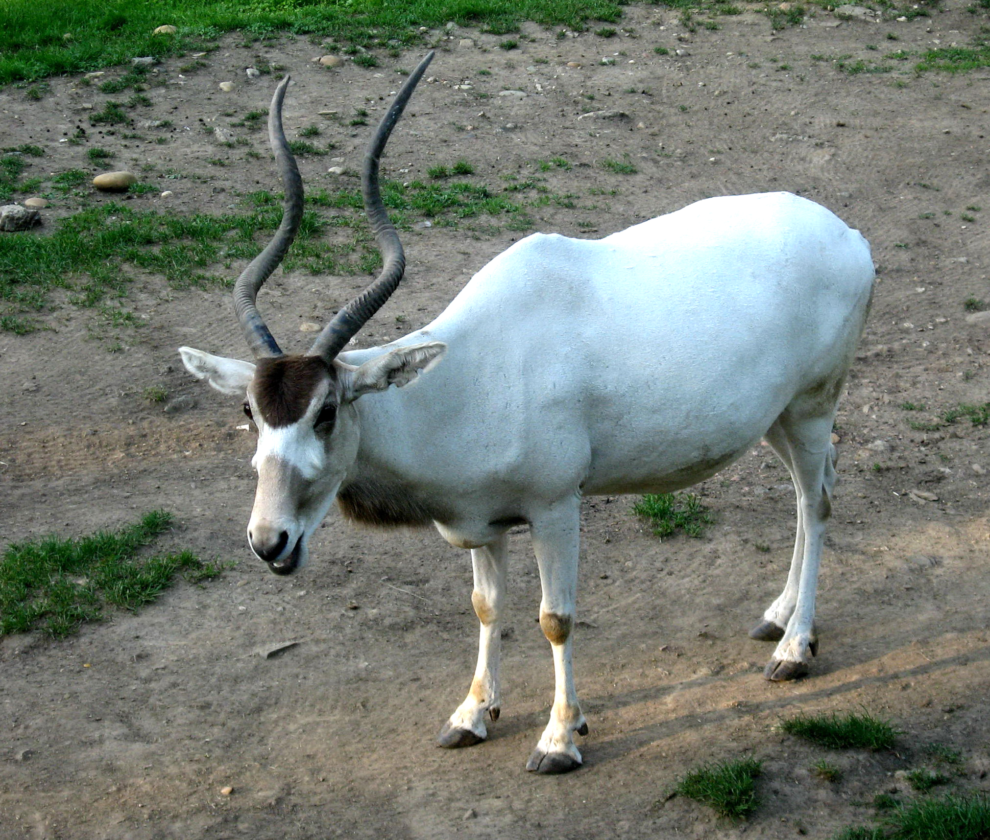 Adax núbijský